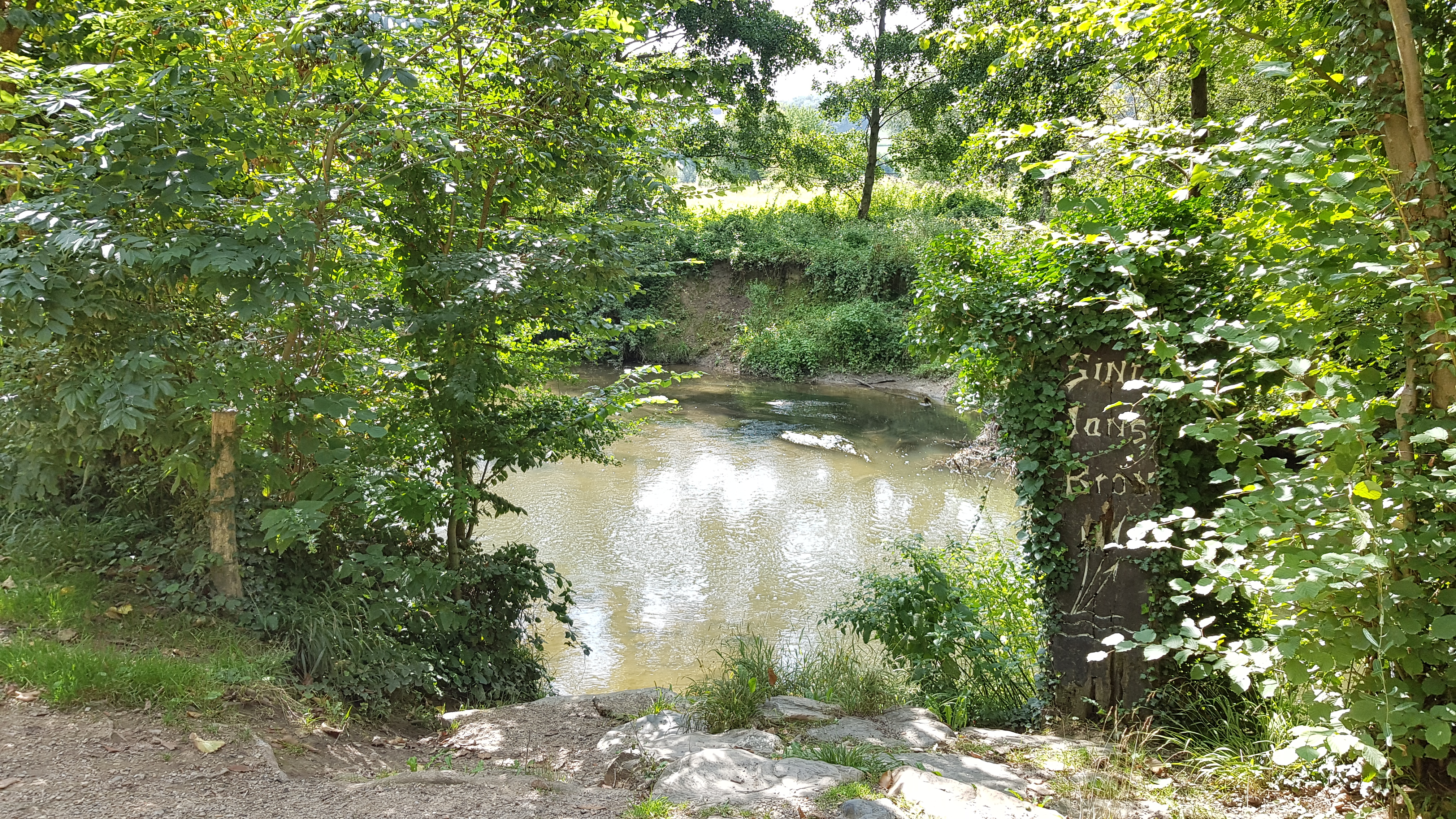 Sint-Jansbron te Valkenburg, Limburg, Nederland